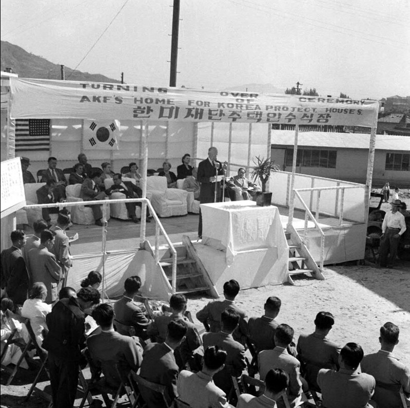 한.미재단 주택인수식 (서울 종로구 행촌동 소재)